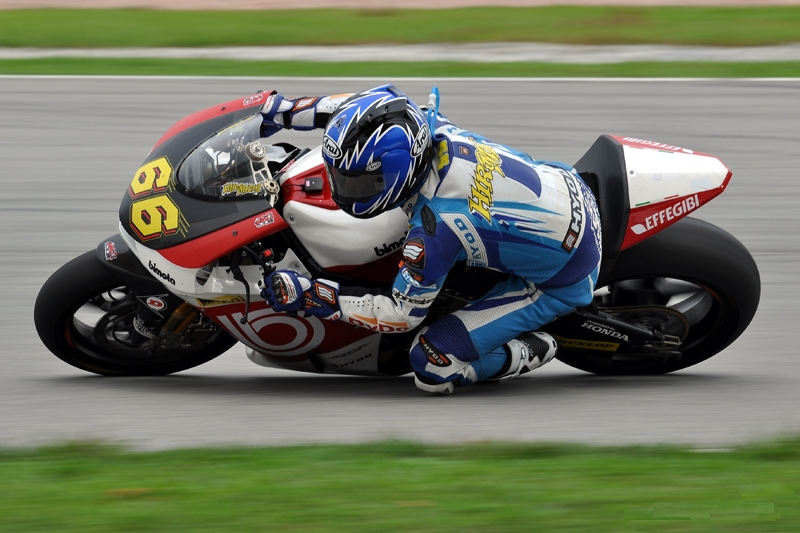 Hiromichi Kunikawa with the Bimota HB4